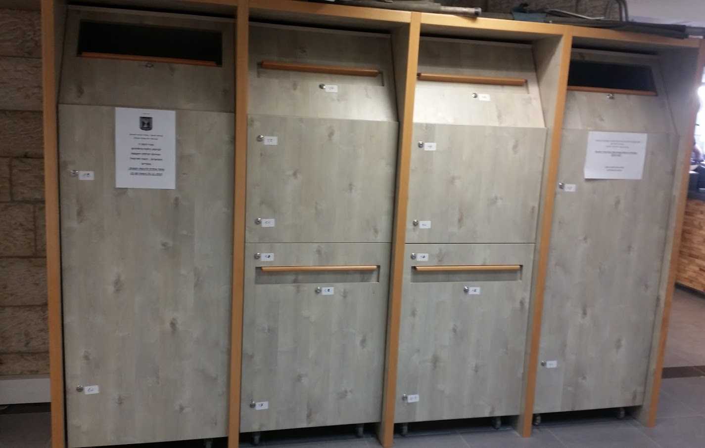 תיבות להגשת מכרז, משרד הבינוי, ירושלים